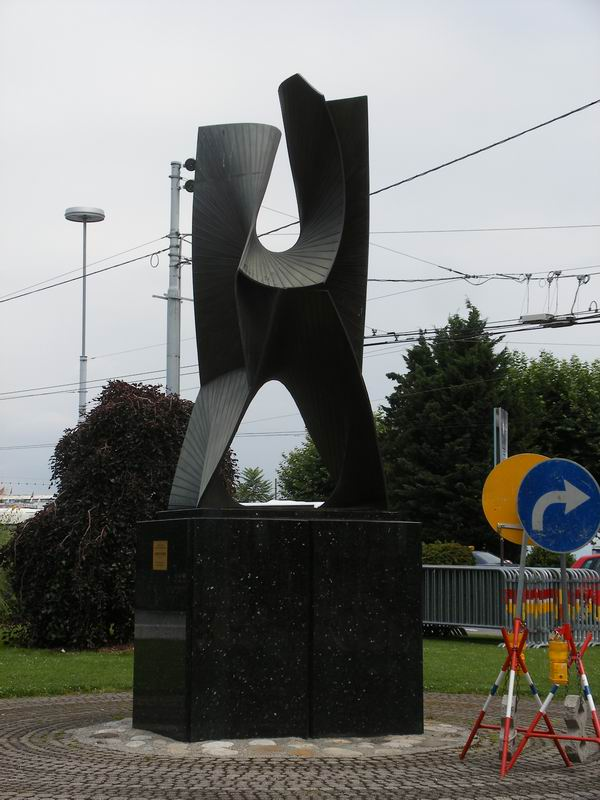 "Construction spatiale aux troisieme et quatrieme dimensions" by Antoine Pevsner. A nice ruled surface.in Geneva/Switzerland